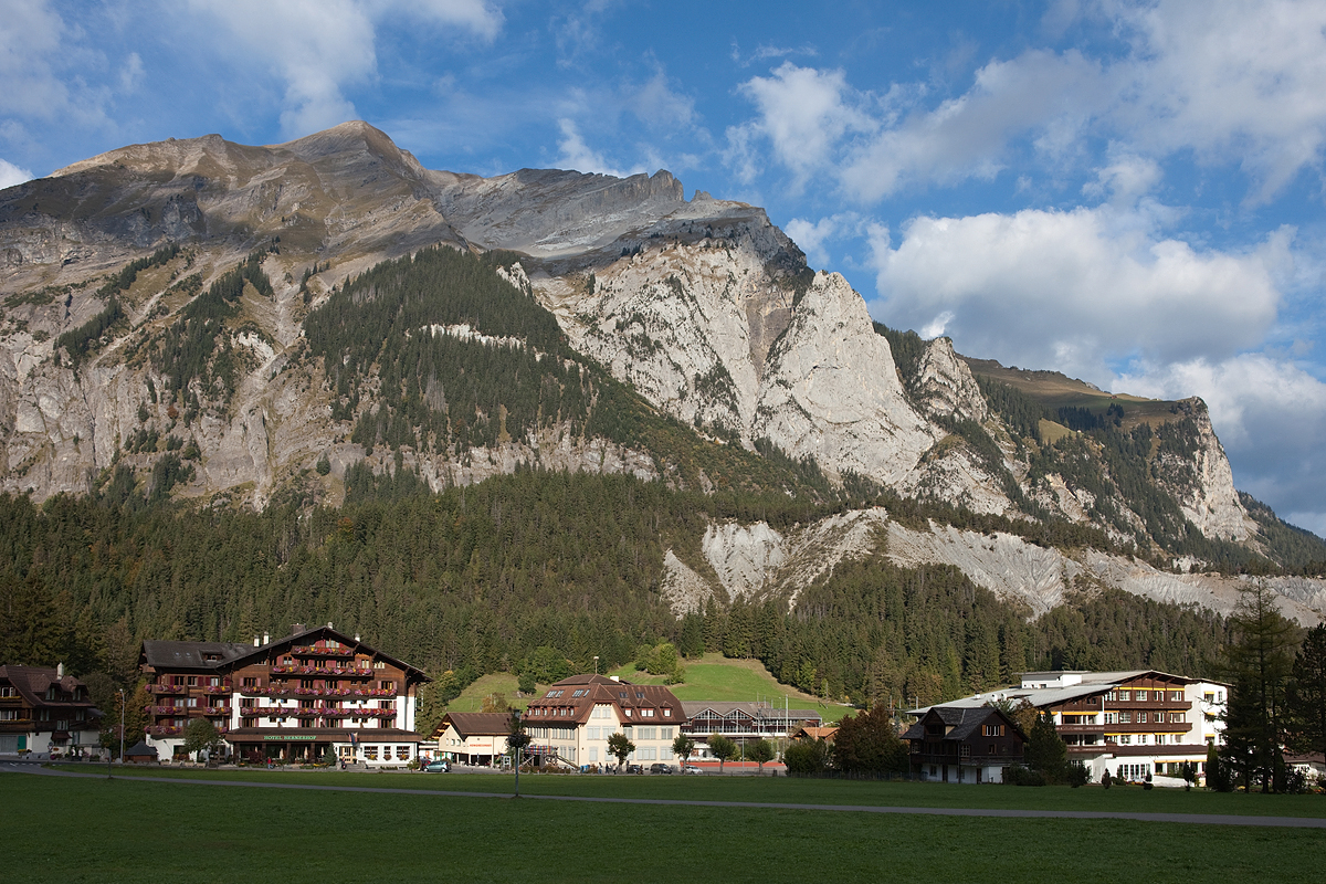 Usseri Hauptstrasse mit Hotels, Schulhaus und Kongresshalle